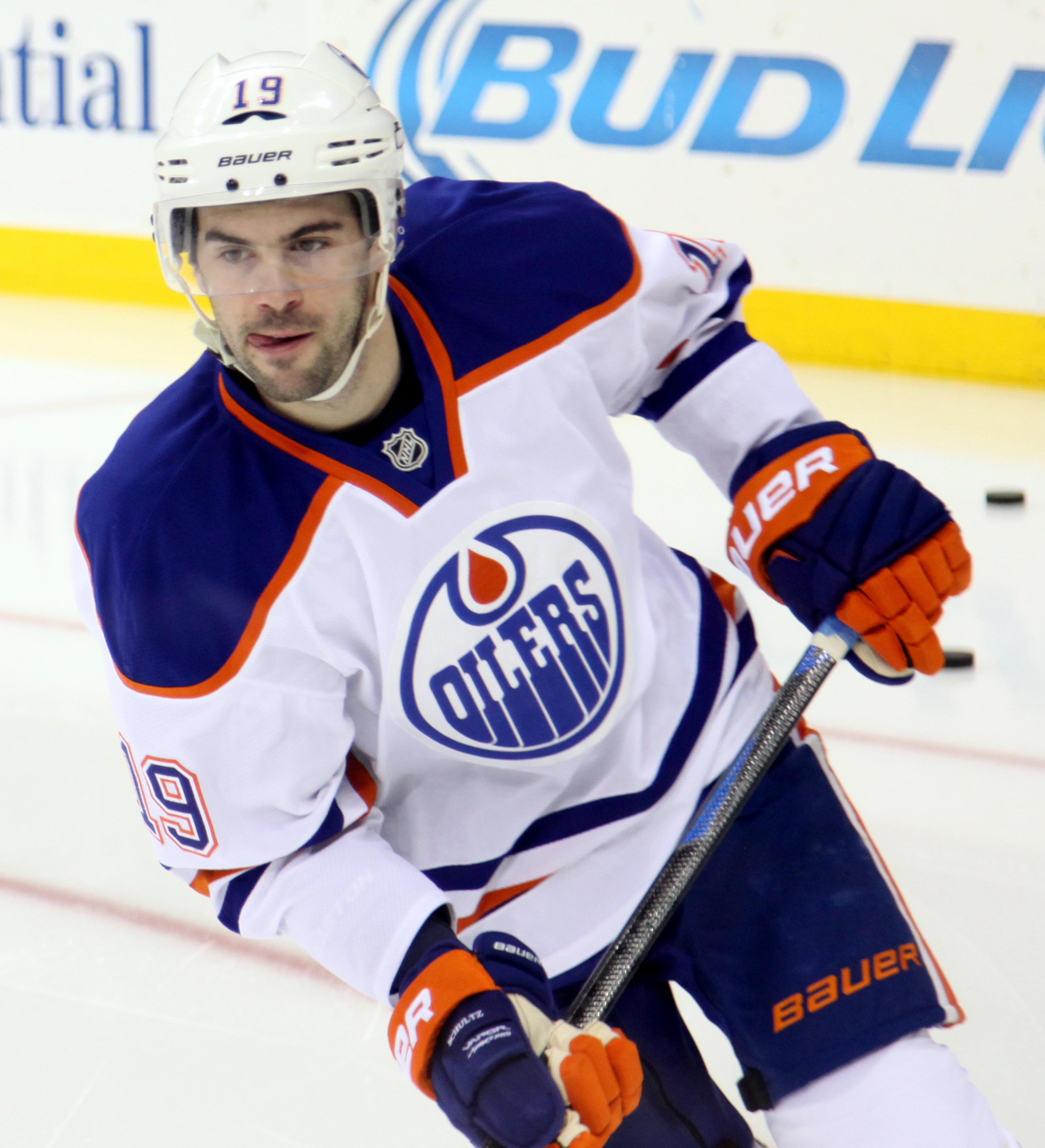 Schultz in February 2015.